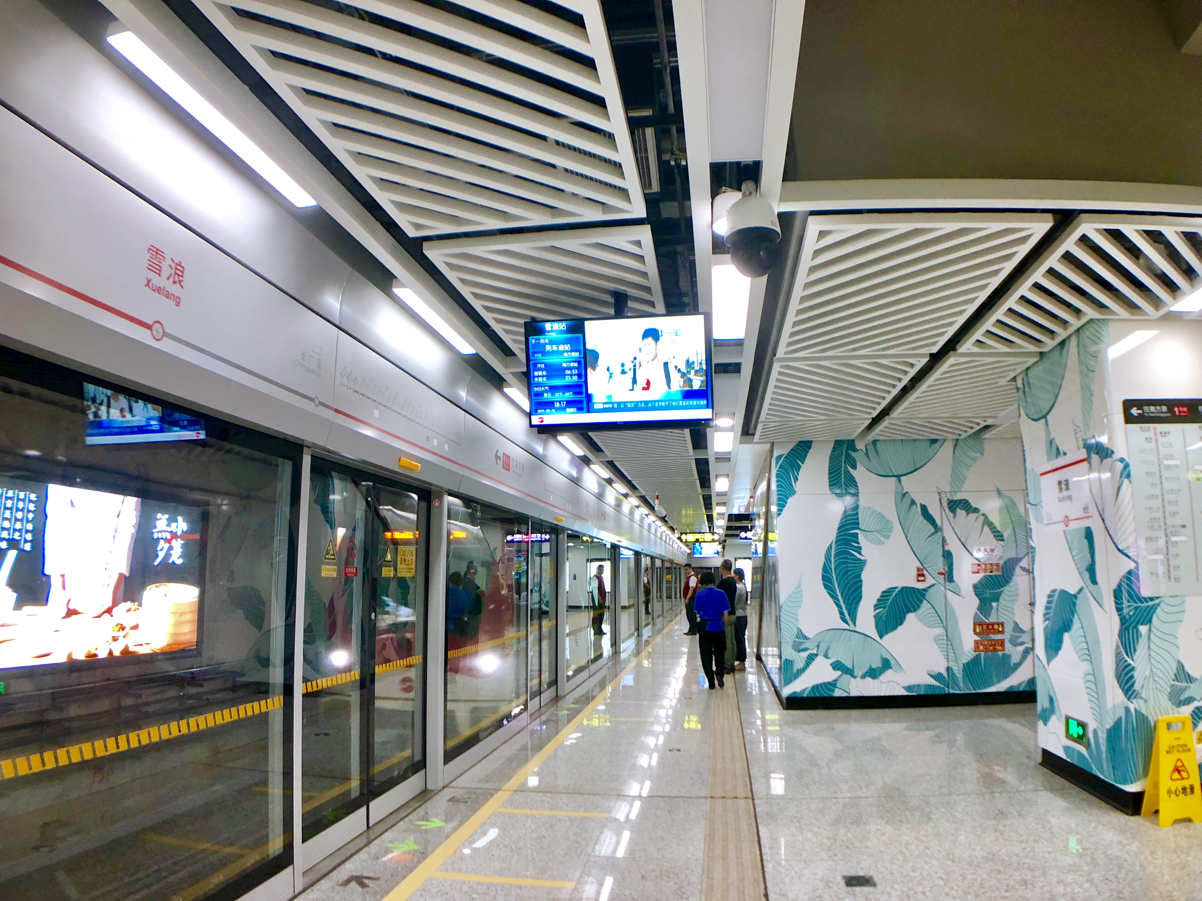 無錫地鐵1號線雪浪站站台